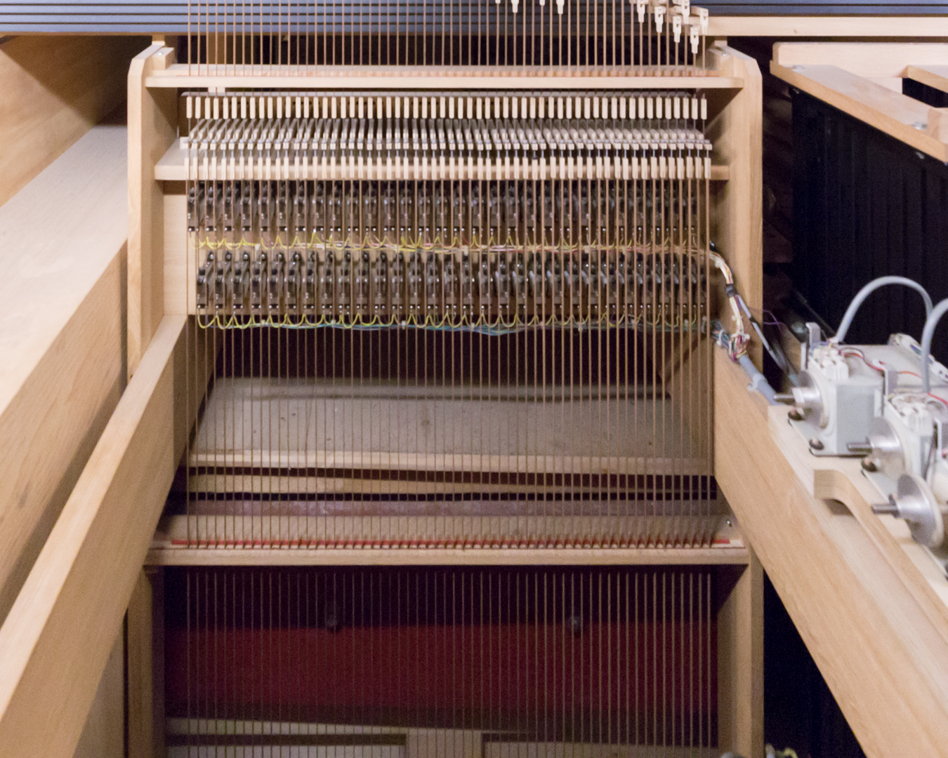 Im Inneren der Orgel. Zuschnitt auf den Koppelapparat.